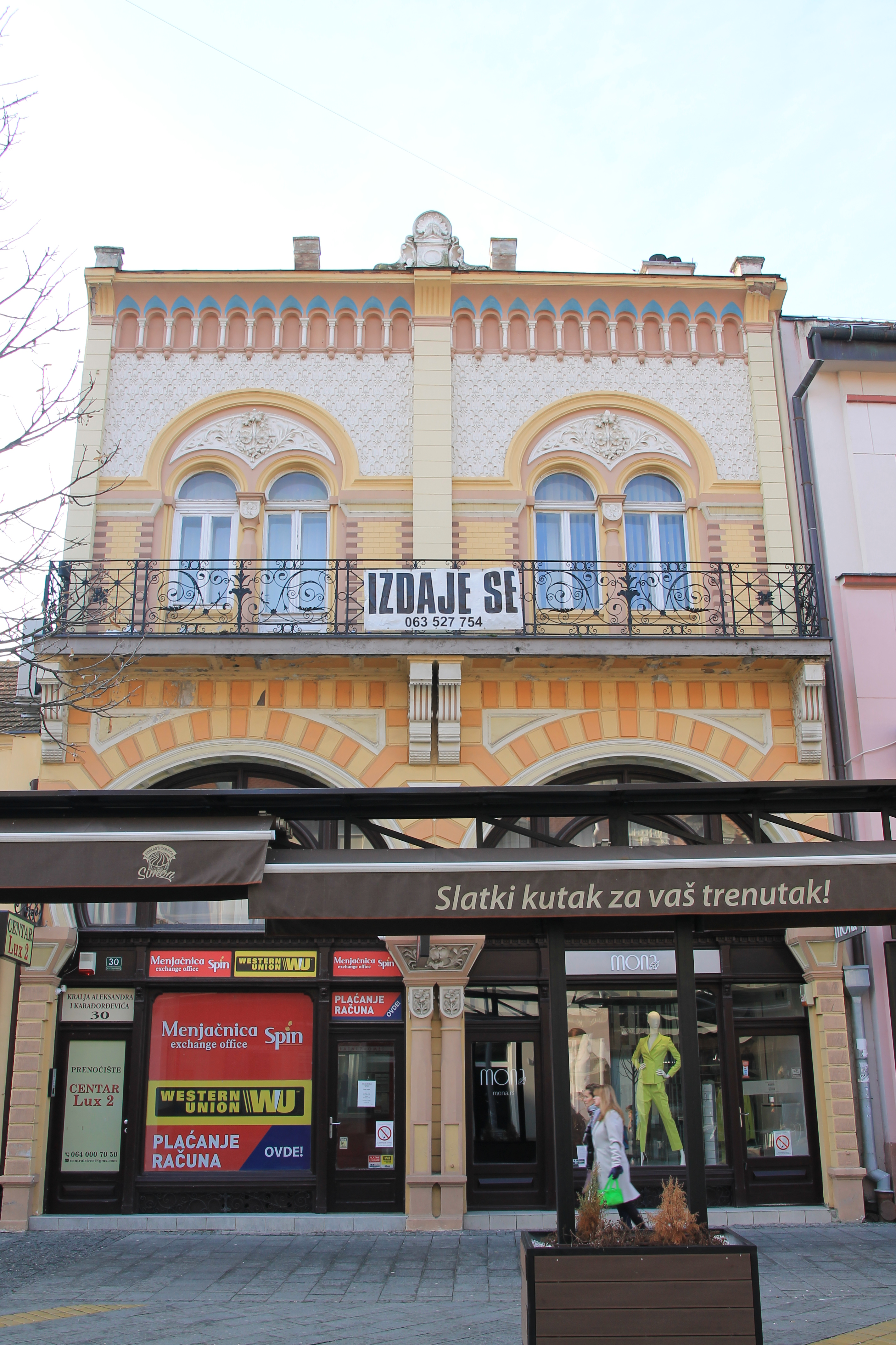 Staro jezgro Zrenjanina